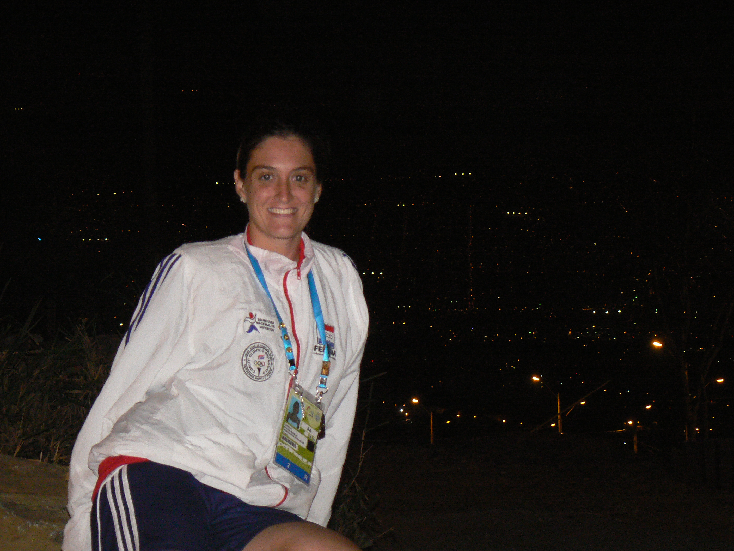 Fotografia de virginie chevalet, primera representante de nado sincronizado del Paraguay, durante los juegos suramericanos-ODESUR 2010 de medellin